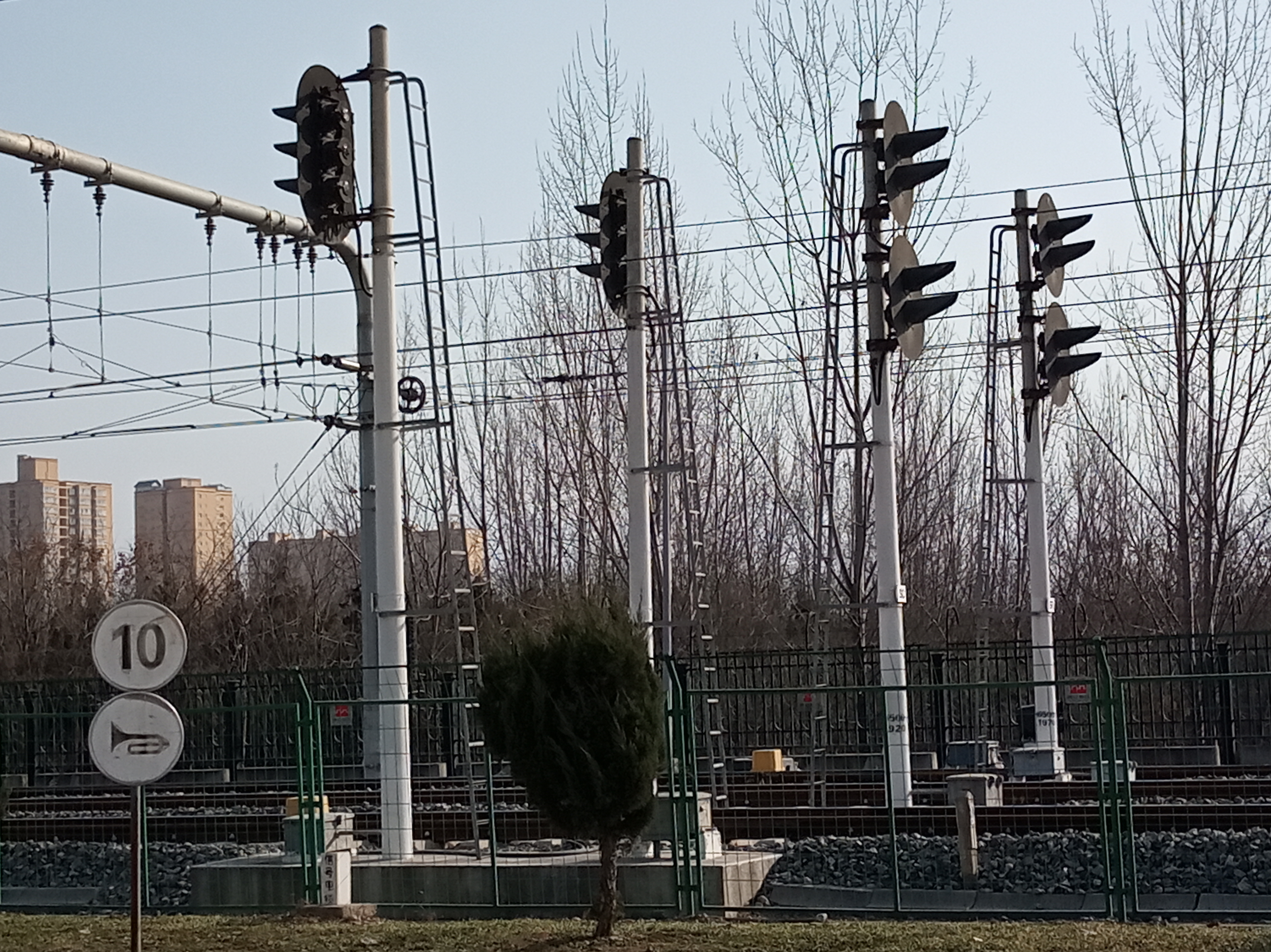 西安地铁二号线潏河停车场